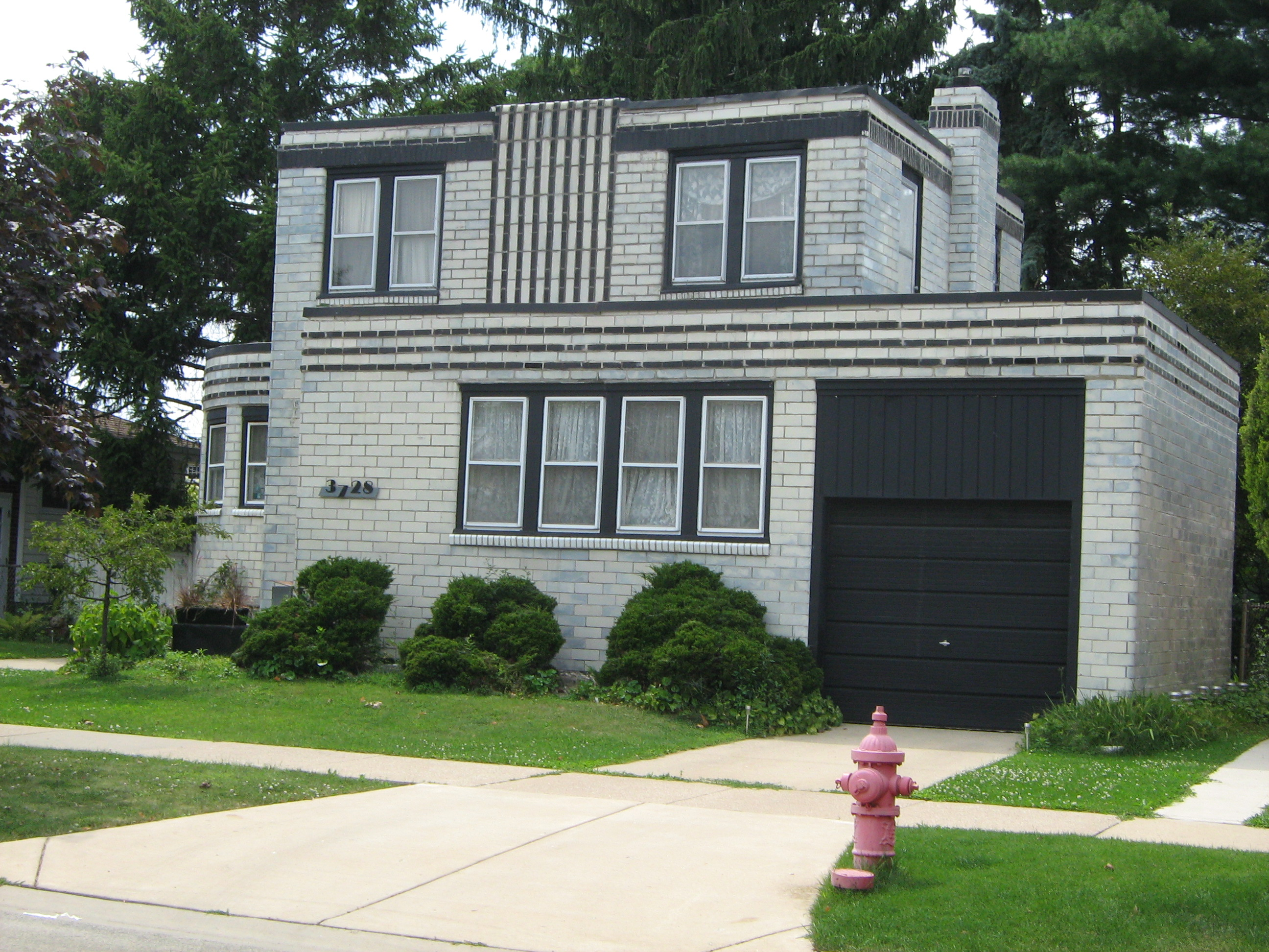 3728 S Cuyler Ave Berwyn, IL 60402